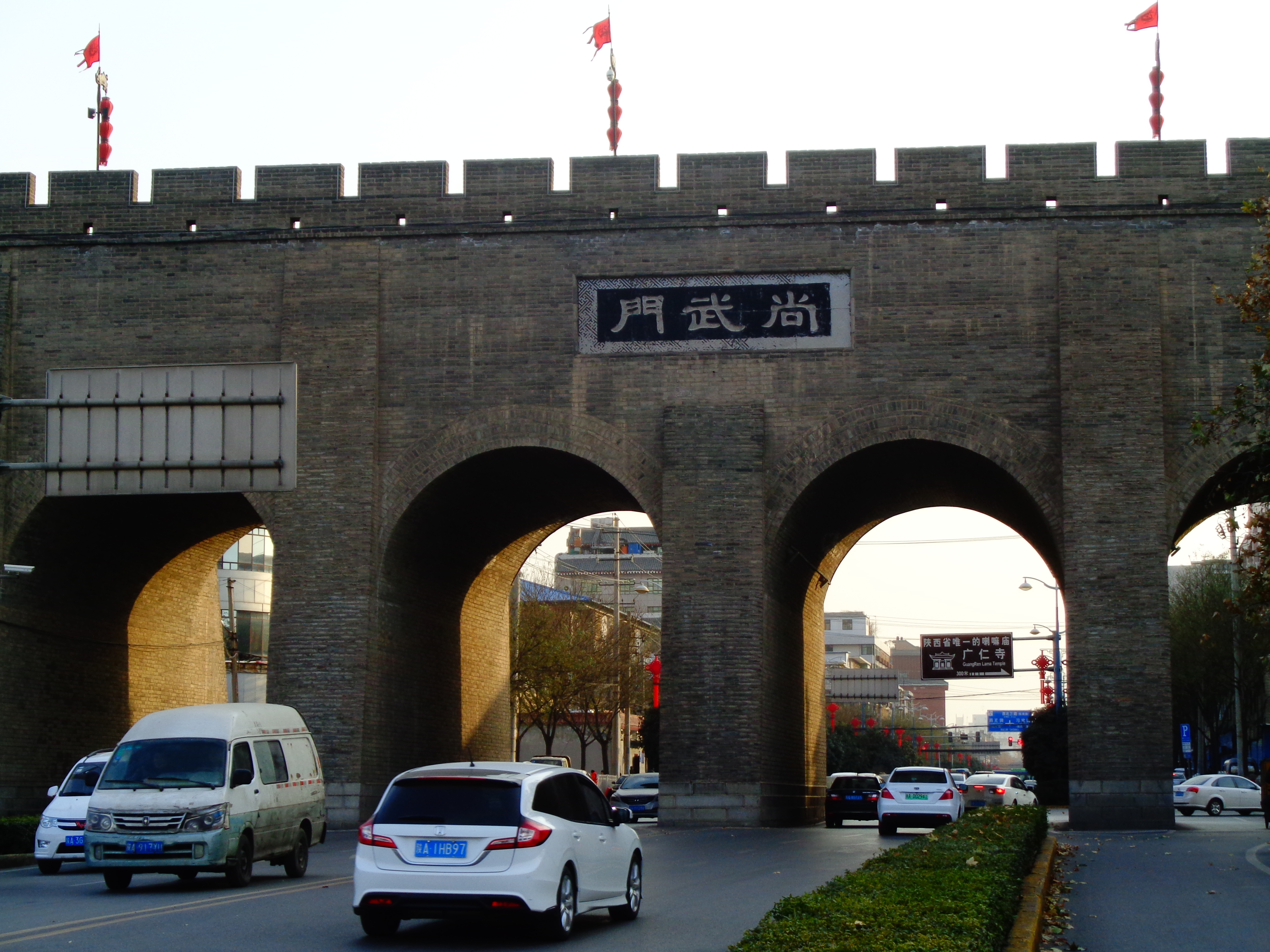 西安市莲湖区城墙尚武门